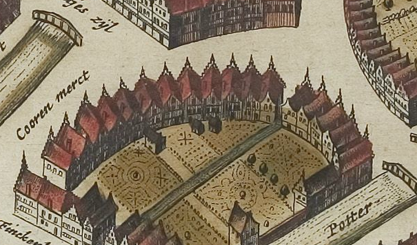 Rodenburg uitsnede Blaeu